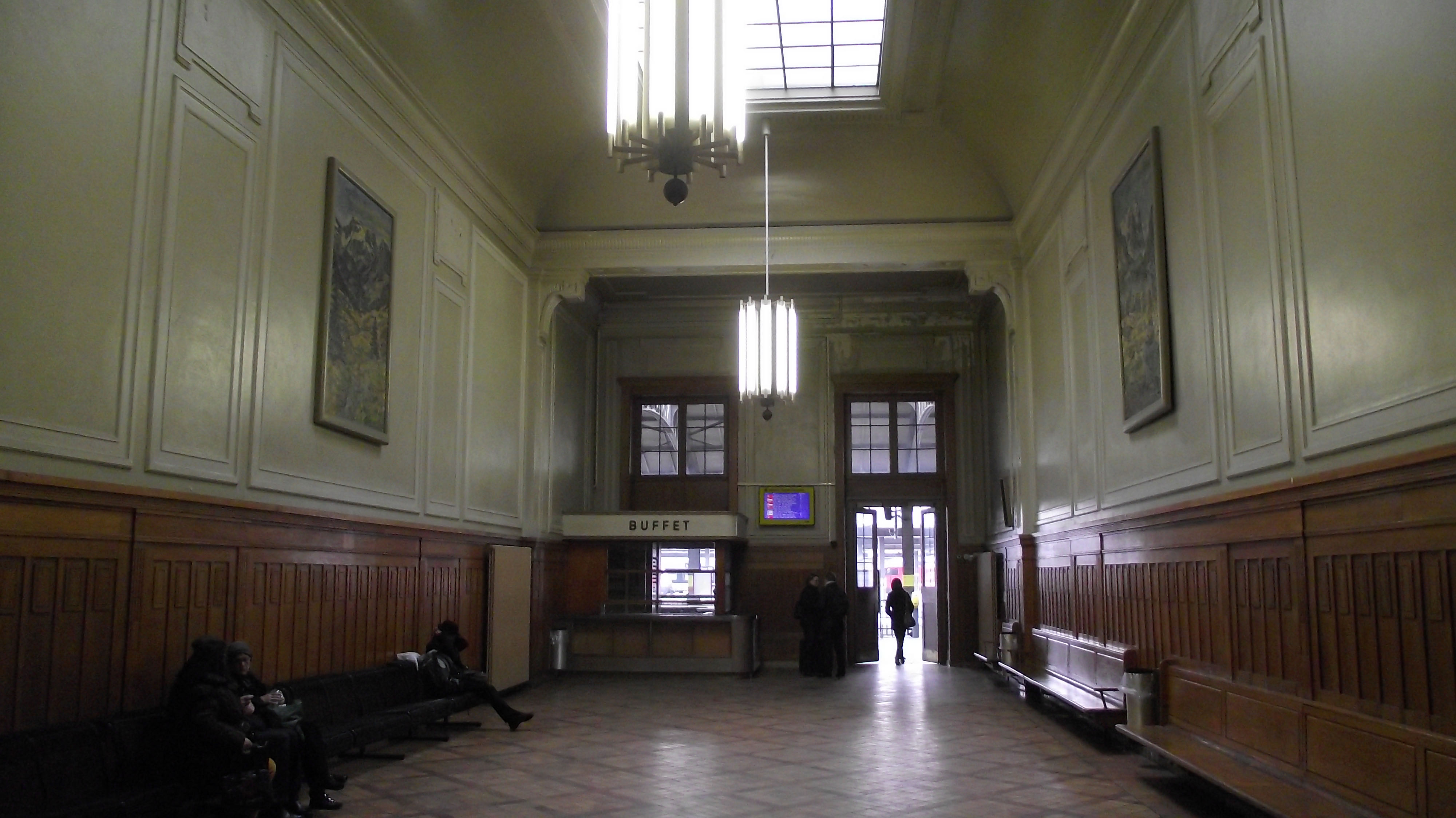 Wachtkamer na de douane.